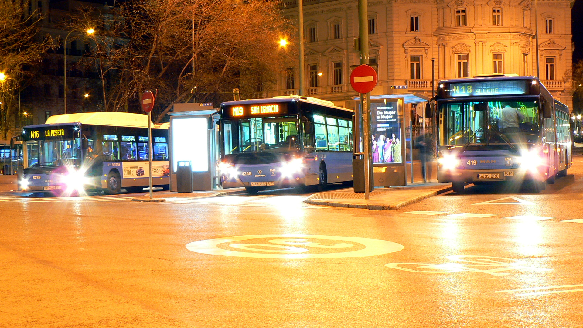 Tres autobuses nocturnos de la EMT de Madrid -uno de ellos articulado y otro de gas natural comprimido- en su cabecera de Cibeles.